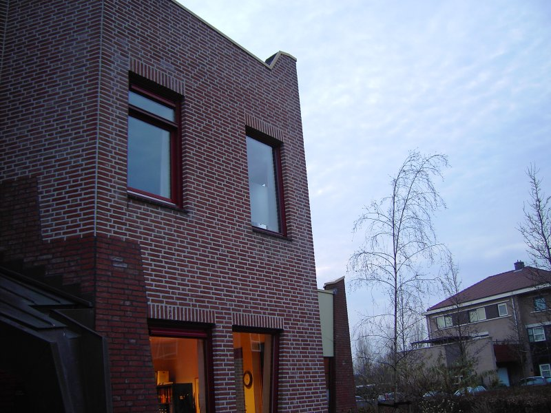 De Steiger, een behandelcentrum voor jongeren met een Autisme Spectrum Stoornis te Dordrecht.